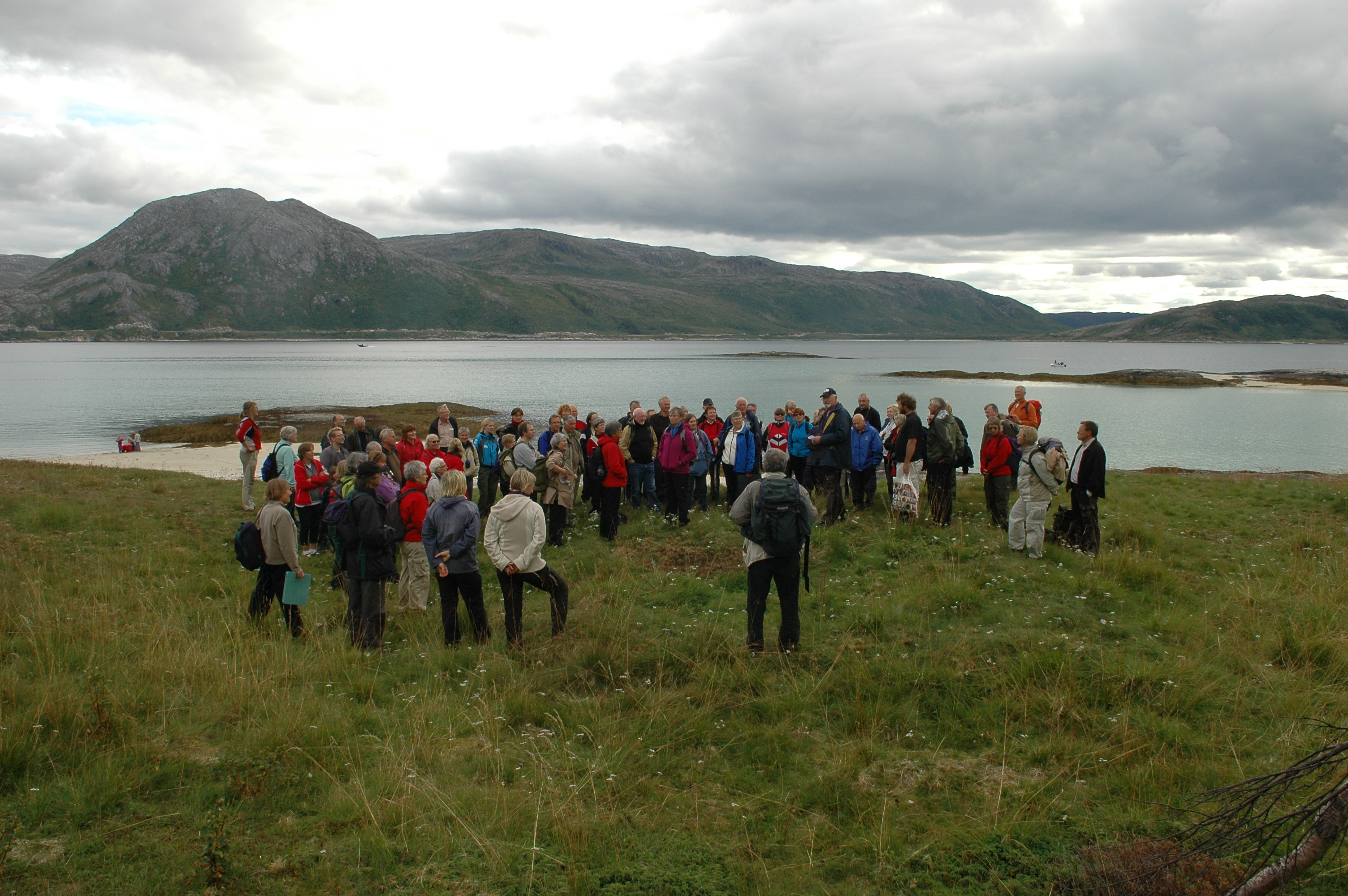 Jemsheimen. August 2009.